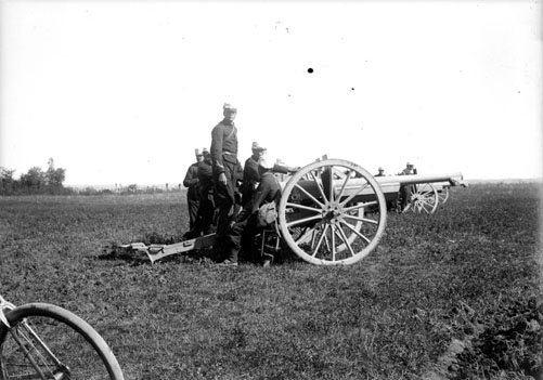 Fonds Trutat - Photographie ancienne Cote : TRU C 1641 Localisation : Fonds ancien (S 30) Original non communicable Titre : Militaires chargeant un canon lors d'une manoeuvre, Excideuil, 1901 Auteur : Trutat, Eugène Rôle de l’auteur : Photographe Lieu de création : Excideuil (Dordogne ; canton) Date de création : 1859-1910 [entre] Mesures : : 6 x 9 cm Mot(s)-clé(s) : -- Officier -- Soldat -- Uniforme -- Képi -- Campagne -- Camp militaire -- Manoeuvre militaire -- Artillerie -- Excideuil (Dordogne ; canton) -- Dordogne (Aquitaine) -- Aquitaine (France) -- 19e siècle, 2e moitié -- 20e siècle, 1e quart Médium : Photographies -- Négatifs sur plaque de verre -- Noir et blanc -- Scènes Bibliothèque de Toulouse. Domaine public